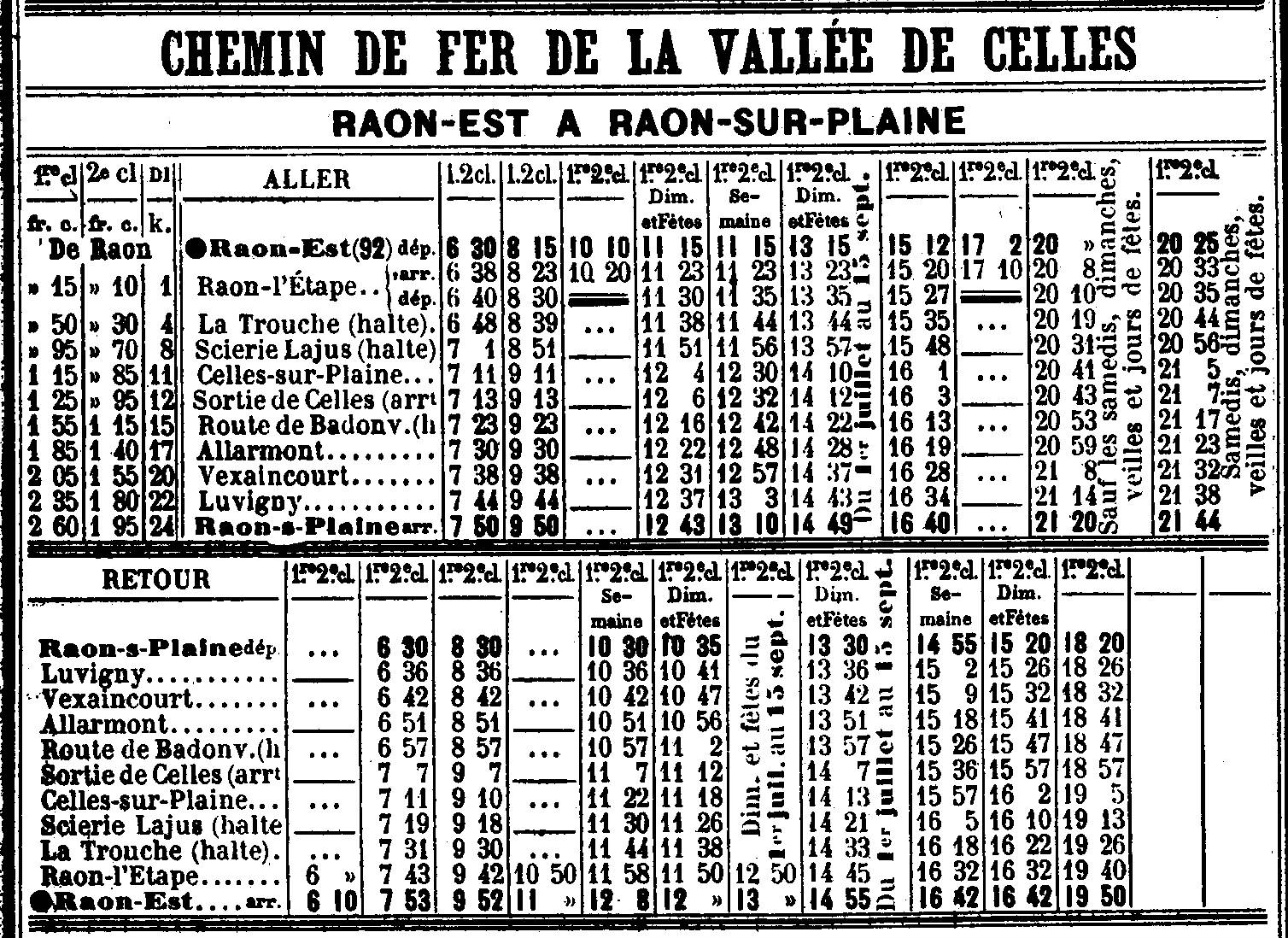 Extrait du livret Chaix de mai 1914, page VI-146 : Horaires du Chemin de fer de la Vallée de Celles